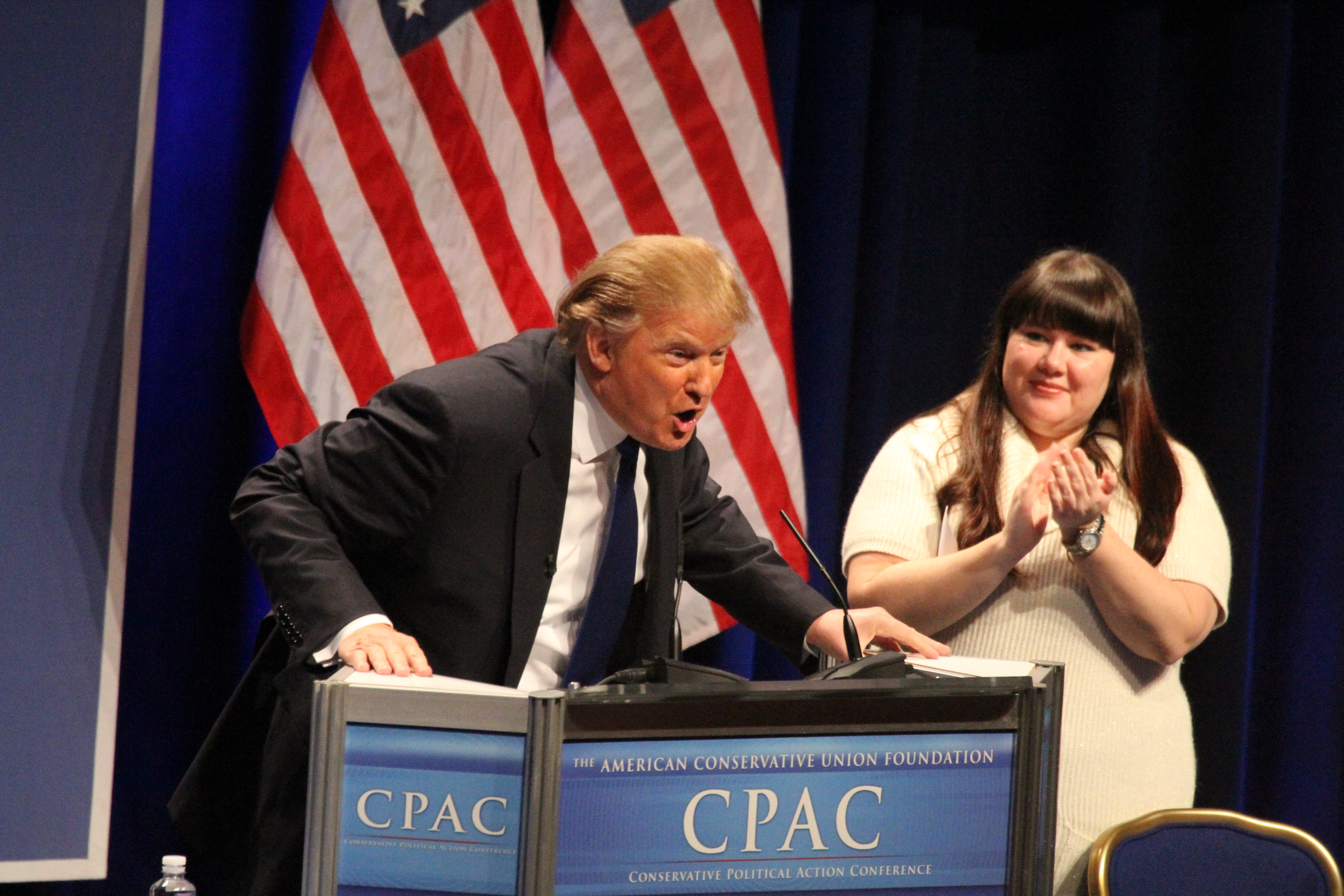 CPAC day 1